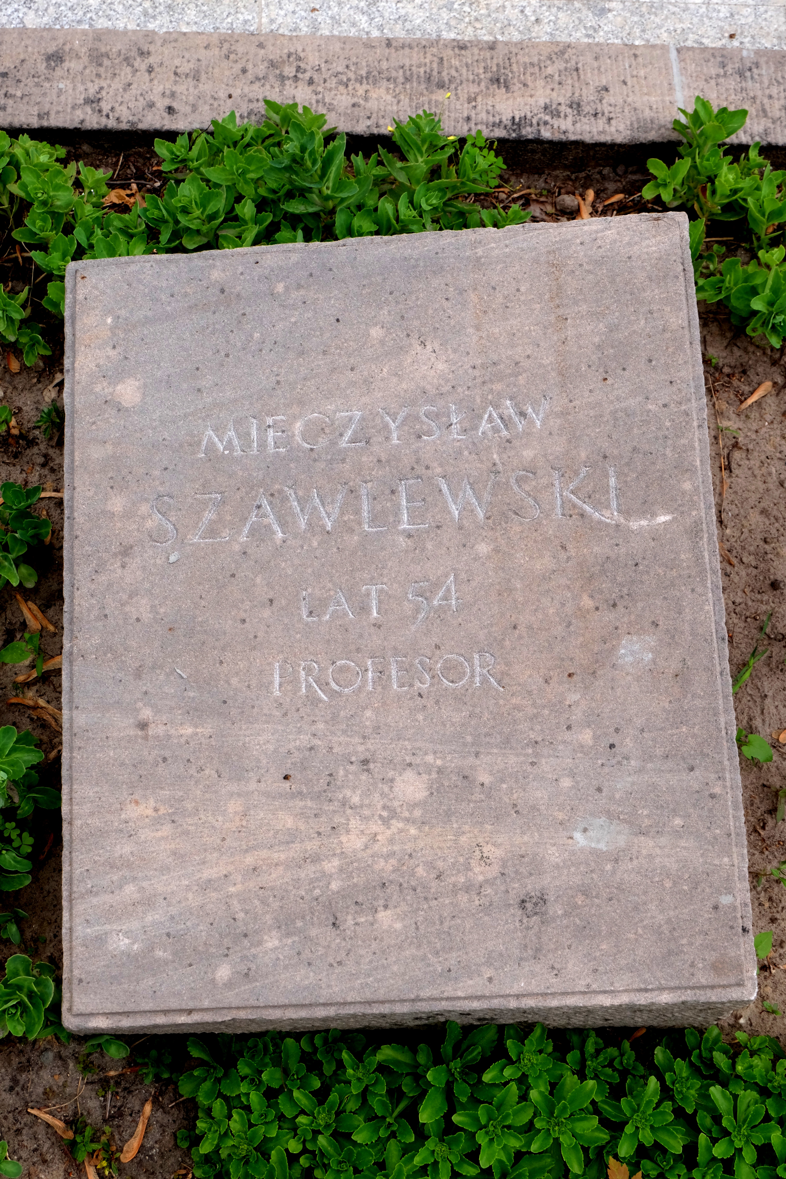 Grób dyplomaty i publicysty Mieczysława Szawleskiego na Cmentarzu Wojskowym na Powązkach w Warszawie